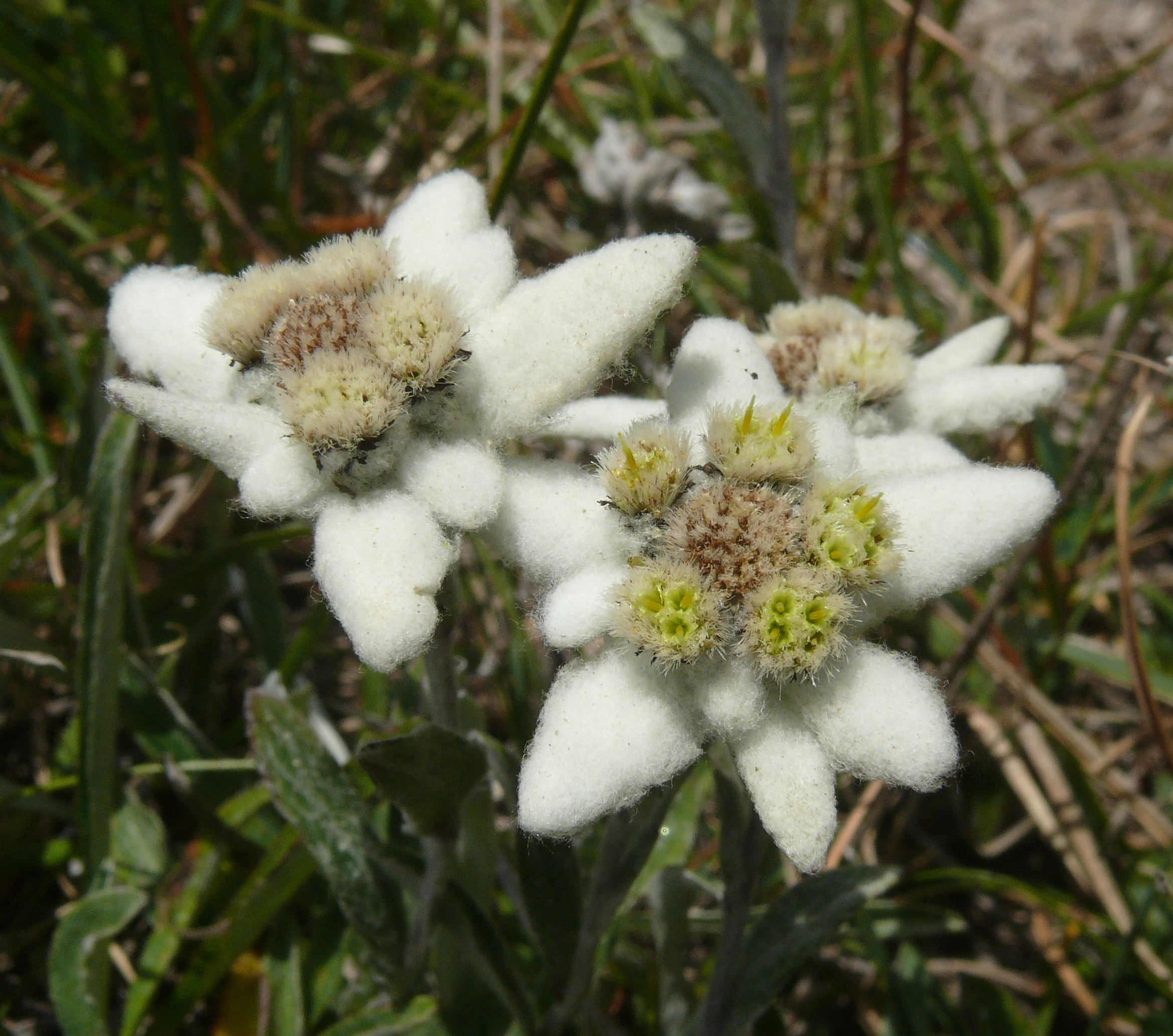 Leontopodium alpinum, Stubaier Alpen, Italien